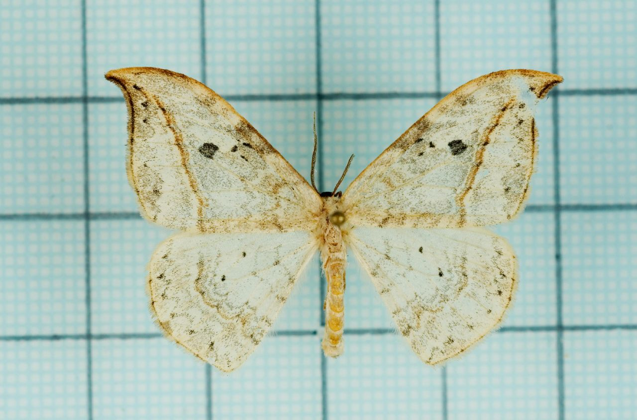 Drepana pallida nigromaculata Okano, 1959 一點鉤蛾 認識台灣的昆蟲 10 蘿紋娥科:P.37 female